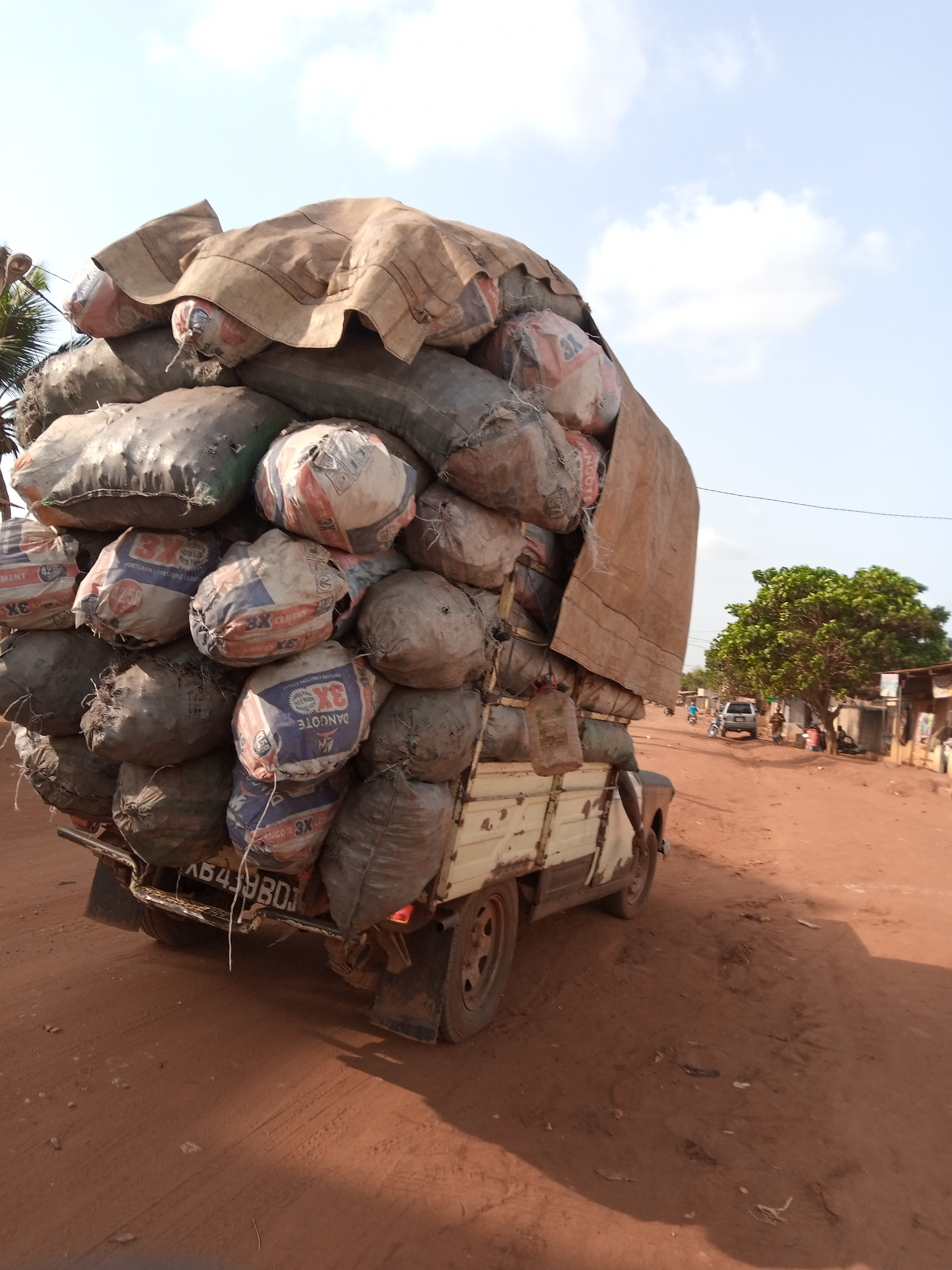 le transport du charbon à Porto-Novo This is an image with the theme "Africa on the Move or Transport" from: Benin